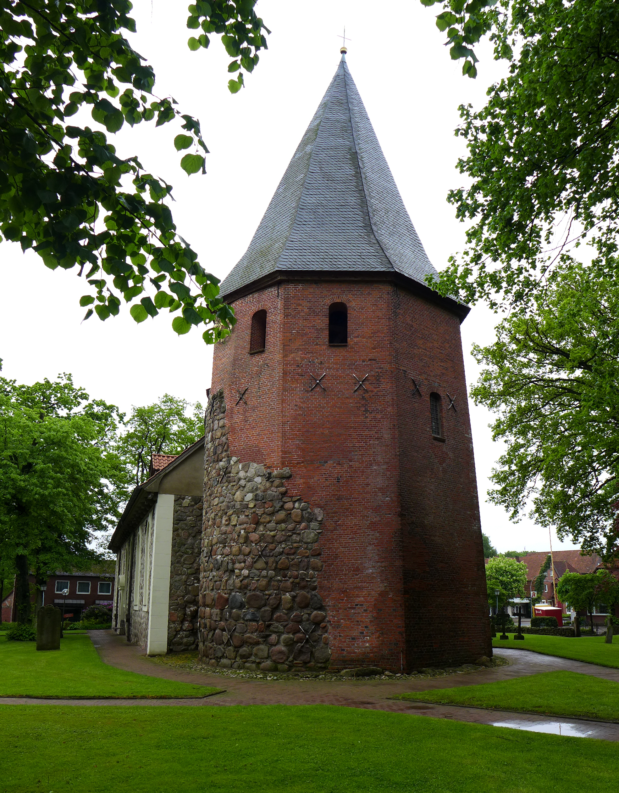 Feldsteinkirche St. Lamberti in Selsingen, Landkreis Rotenburg (Wümme). Grundmauern des Kirchturmes etwa aus dem 11. Jahrhundert. Innerhalb des Turmes die Lambertus-Glocke, gegossen 1469 von Hinrich Klinghe. Das heute sichtbare Kirchenschiff stammt aus dem Jahre 1725. Ev.-Luth. Kirche und Gemeinde.